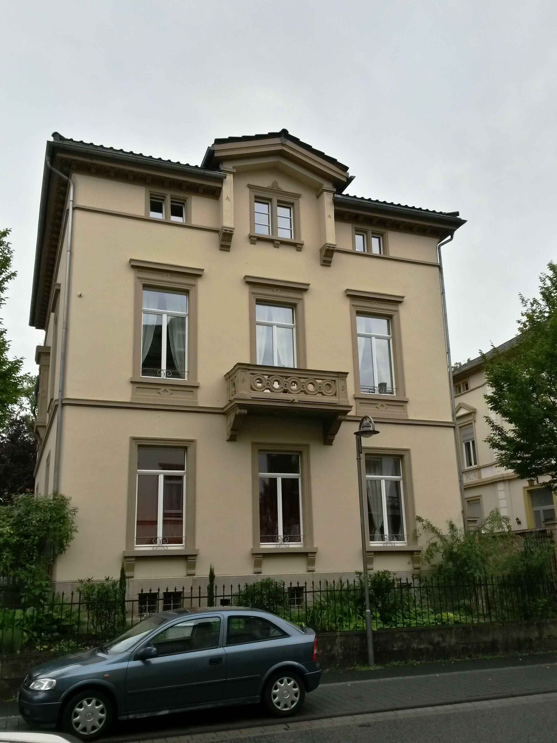 Wohnhaus in Bingen am Rhein, Mainzer Straße 32, villenartiges spätklassizistisches Wohnhaus, um 1864.